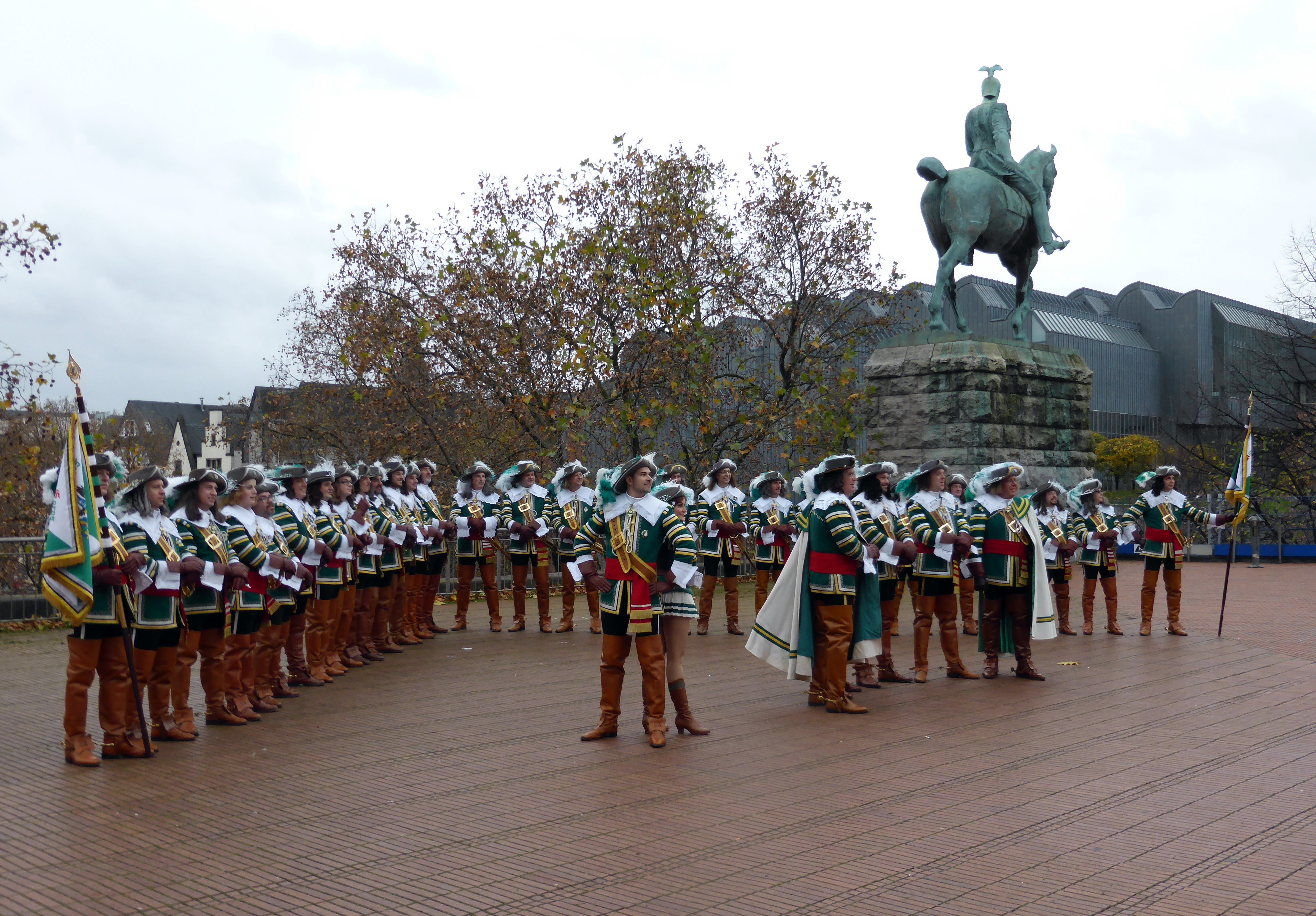 Fototermin des Reiter-Korps „Jan von Werth“ am 14. November 2015.